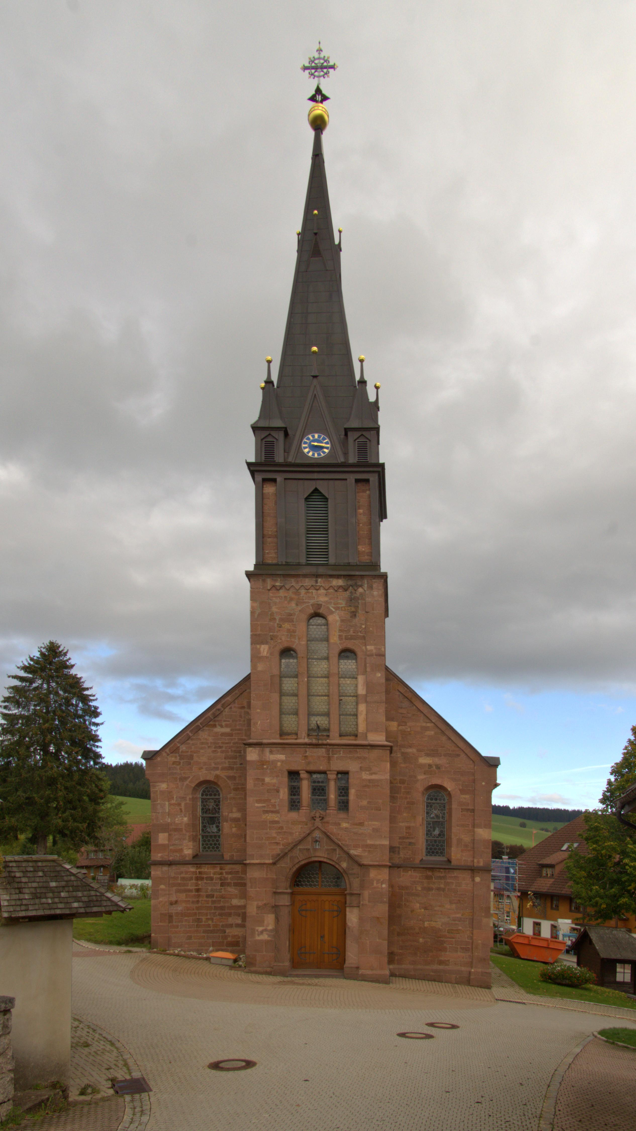 Die Pfarrkirche St.Nikolaus in Waldau Die Ortschaft Waldau gehört zu Titisee-Neustadt